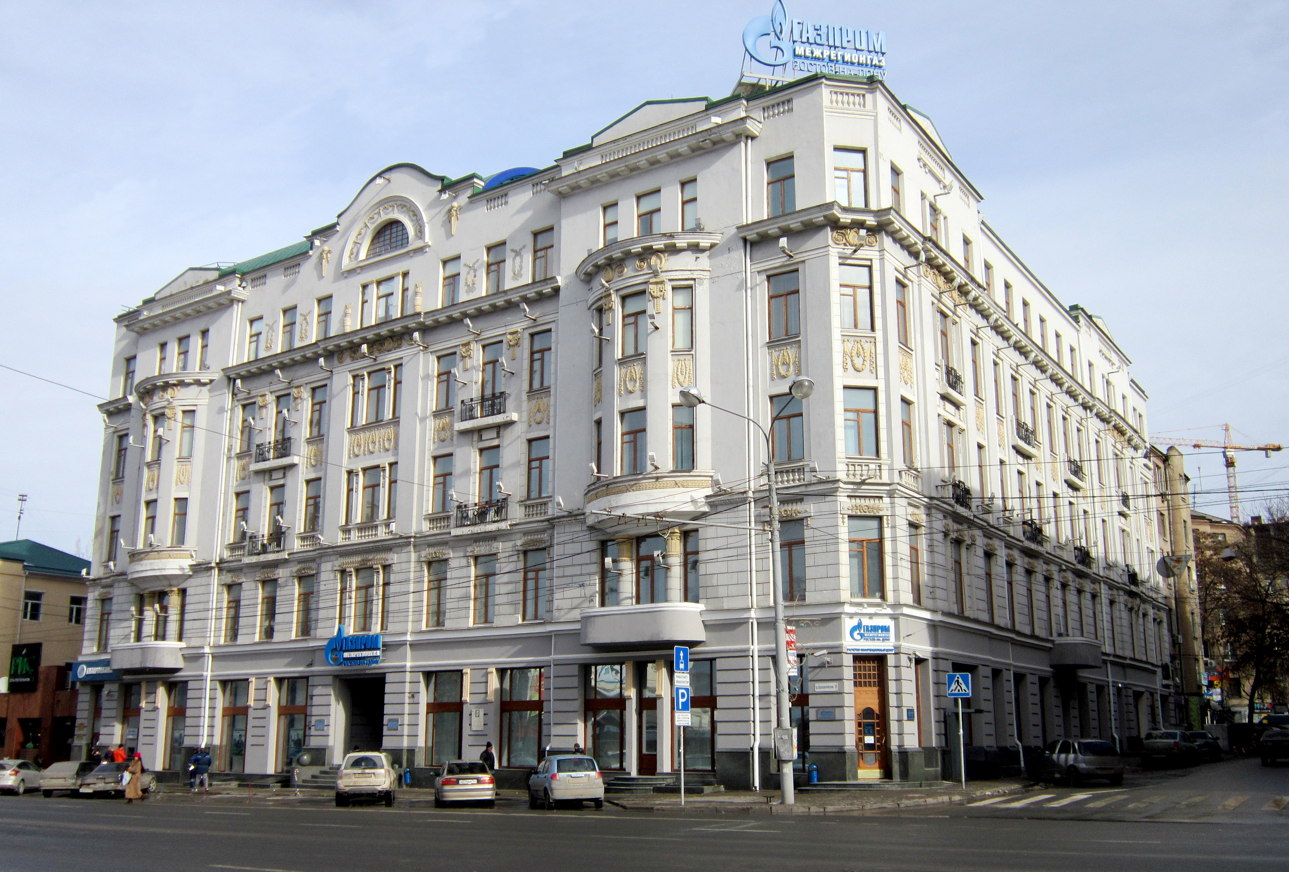 Дом М.В.Ширмана построен по проекту архитектора А.Х.Закиева в 1911 г. Памятник входит в число значительных общественных зданий 1910-х гг. в стиле модерн, определяющих силуэт и масштаб старого центра Ростова-на-Дону. Здание располагается на углу Большого Столыпинского проспекта (ныне Ворошиловский проспект) и Малой Садовой улицы (ныне ул. Суворова). В здании располагались различные учреждения, в том числе, в 1920-е гг. Ростовская Ассоциация Пролетарских писателей и клуб рабкоров газеты "Молот" (так называемый Дом Печати). В начале 1920-х гг. здесь был создан первый в городе пионерский отряд "Спартак" и организован центральный клуб юных пионеров города. В феврале и ноябре 1926 г. в Доме Печати выступал В.В.Маяковский, неоднократно приезжавший в Ростов. Перед Великой Отечественной войной здание передано НКВД. После войны здание было приспособлено под гостиницу ("Южная"), в 1-ом этаже разместился кукольный театр. В начале 1970-х гг. часть первого этажа передана ресторану гостиницы. На фасаде здания по проспекту Ворошиловскому установлены две мраморные мемориальные доски с текстами: "В этом здании в 1922 г. был создан первый пионерский отряд "Спартак" и в 1923 г. центральный Клуб юных пионеров г. Ростова-на-Дону"; "В этом доме выступал 28 ноября 1926 г. лучший талантливейший поэт нашей советской эпохи В.В.Маяковский". Здание пятиэтажное, со скатной крышей; в плане четырехугольное с внутренним двором сложной конфигурации. Двор имеет въезд с ул. Суворова. Первоначально пять лестниц связывали этажи здания, две лестницы - подвал с первым этажом. Здание является градоформирующим элементом исторически сложившейся застройки центральной улицы г. Ростова-на-Дону. Памятник архитектуры начала XX века, характерный пример общественного здания в стиле модерн. Памятник связан с творческой деятельностью выдающегося советского поэта В.В.Маяковского и историей формирования Ростовской областной писательской организации.